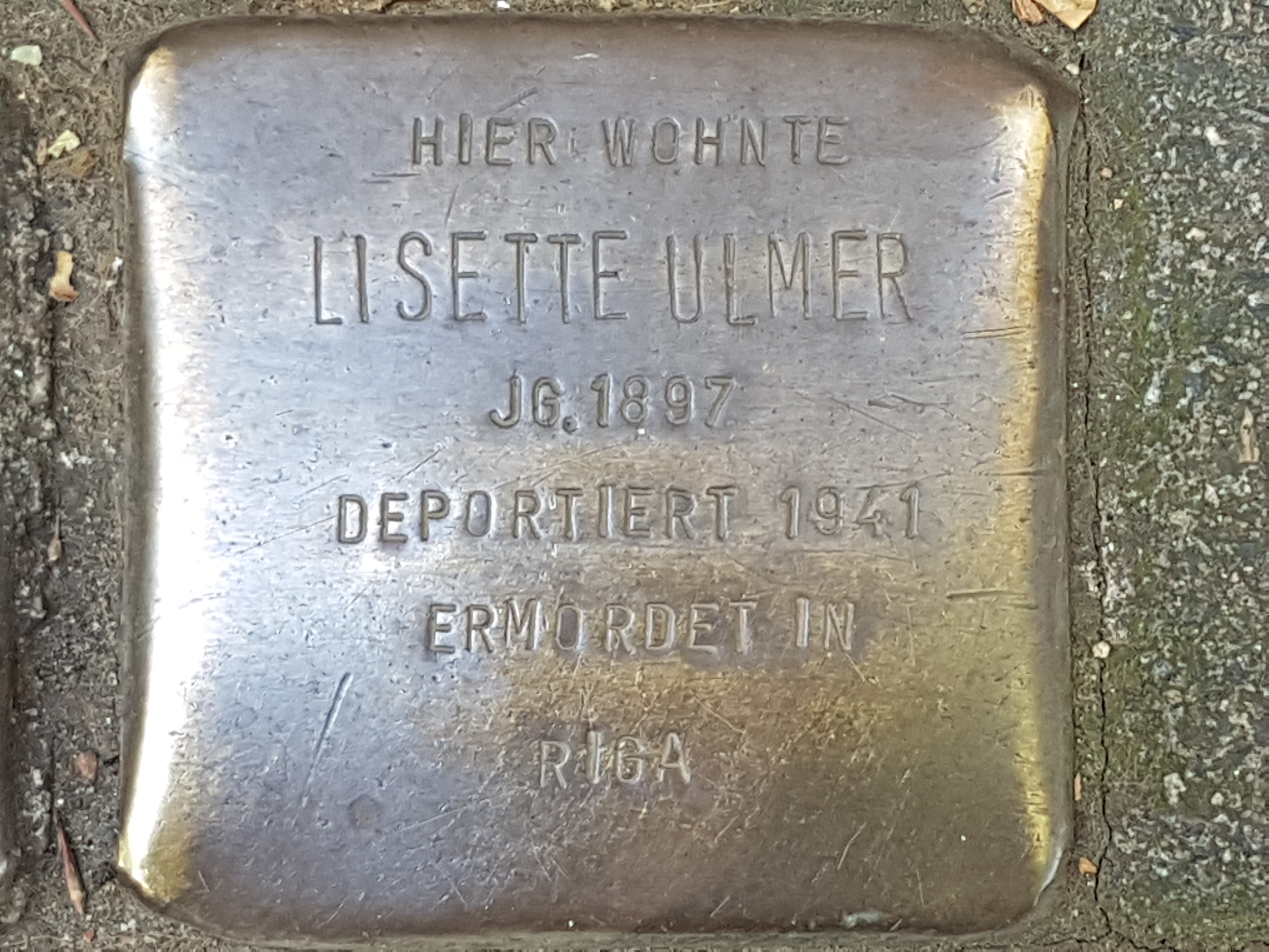 Stolperstein Duisburg